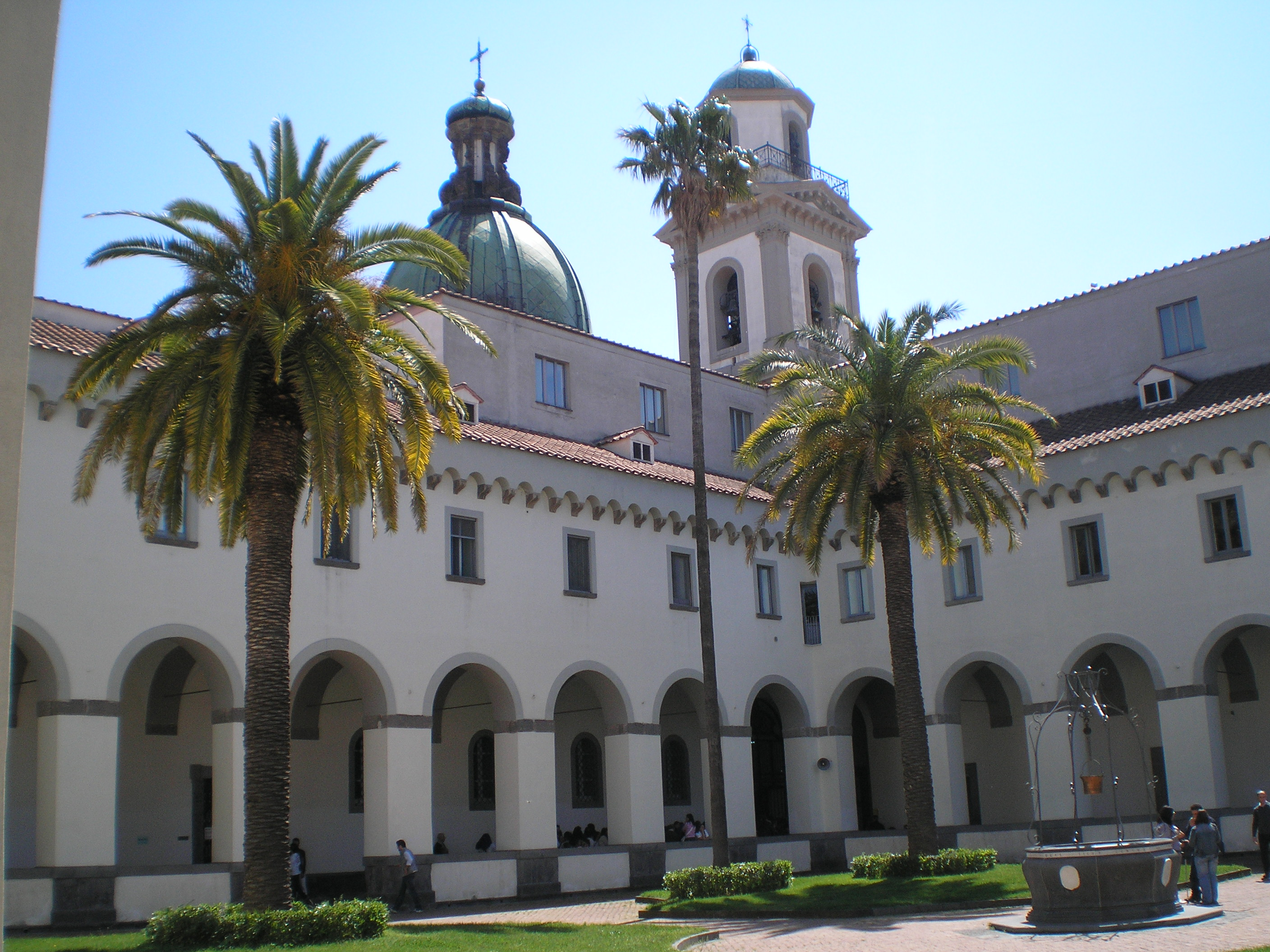 madonna dell'arco FOTO DI PEPPE PEPE DI ANGRI